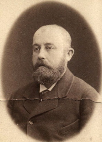 Щапов Илья Васильевич (купец)